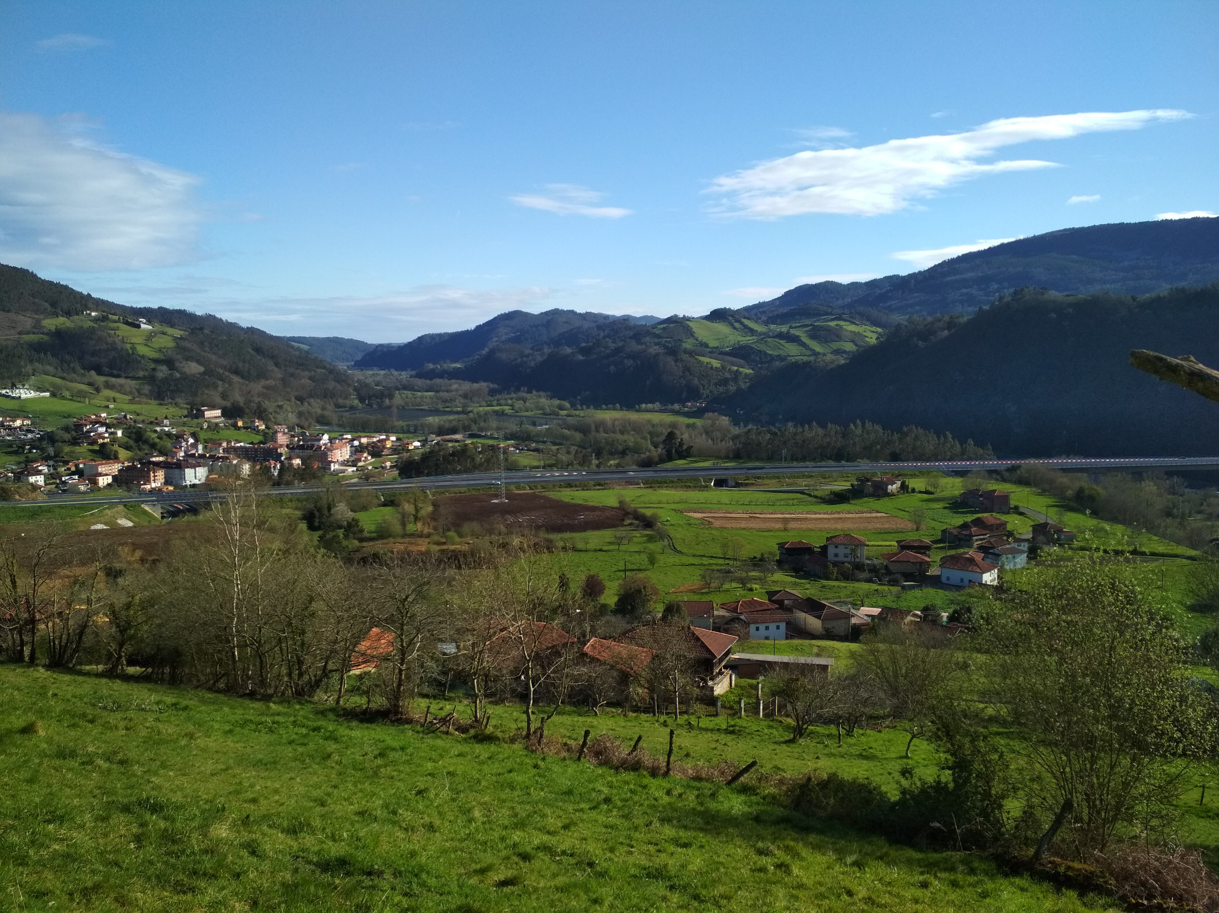 Panorámica de la parte inferior de Sobrerriba, Cornellana